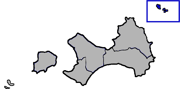 台灣省金門縣烏坵鄉